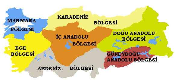 Original